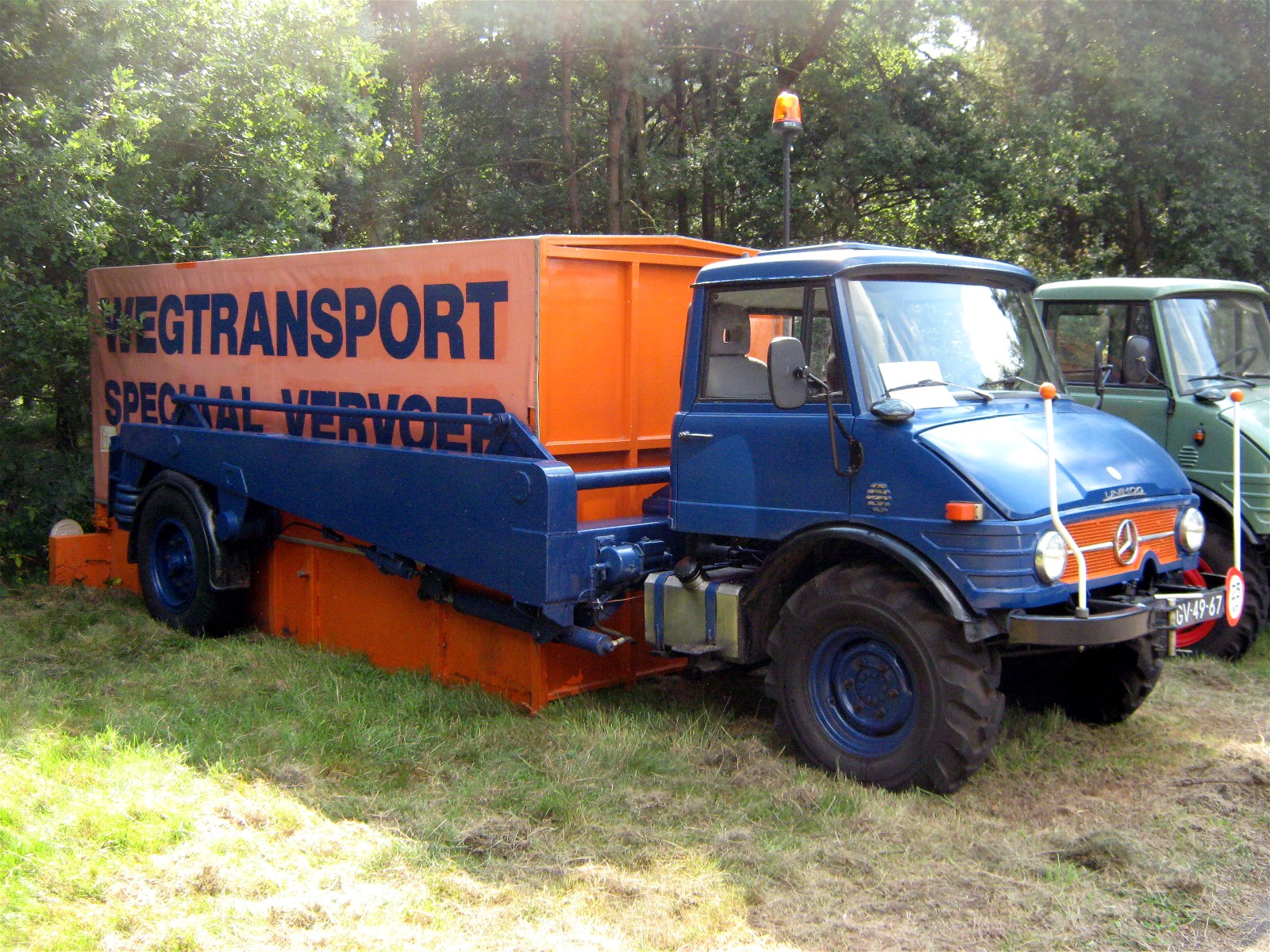 Vliegfeld Weelde, 21ste Oldtimer Festival des Historische Machineclubs Kempen, Unimog-Triebkopf mit Container-Transporteinrichtung